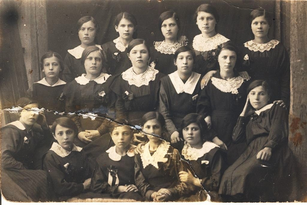 בית ספר לבנות, טורוב